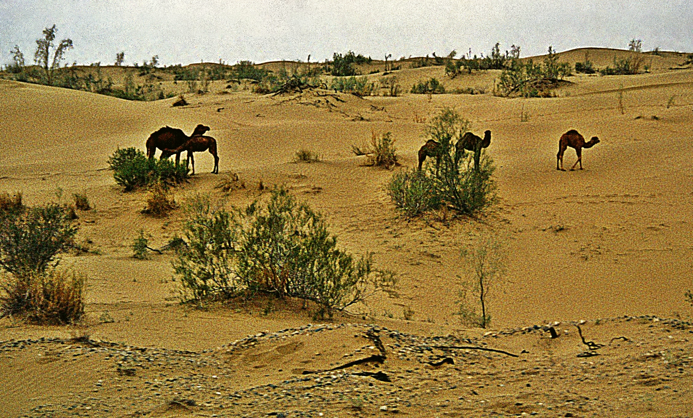 Karakum